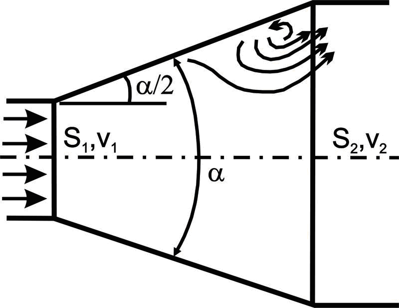 Схема дифузора